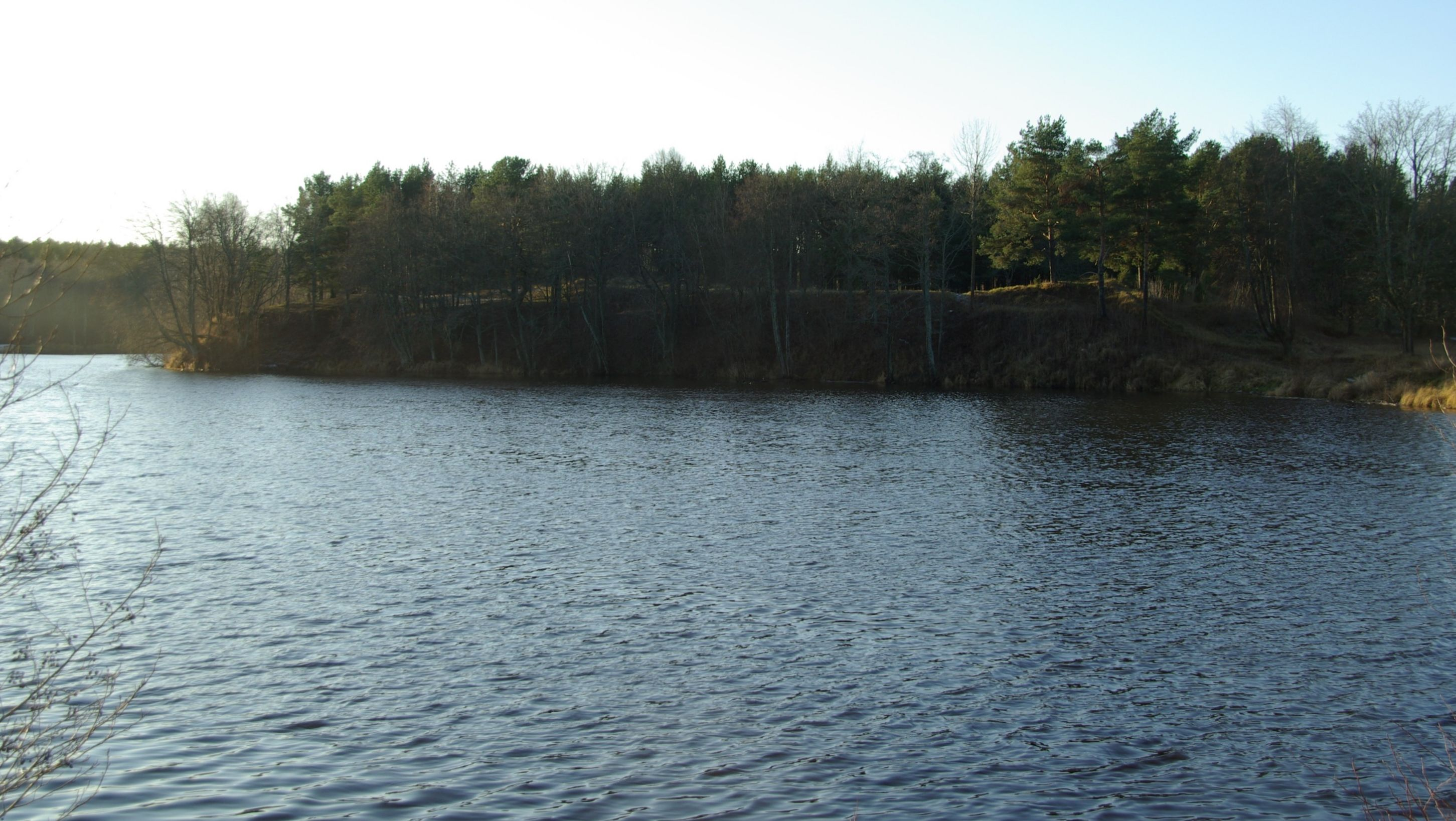 Jägala Jõesuu linnamägi